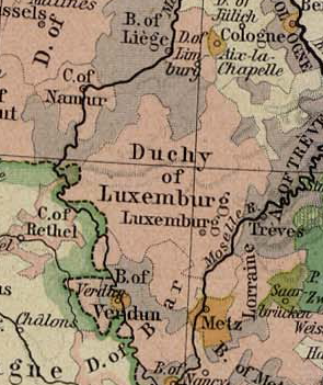 Luxemburg 1477